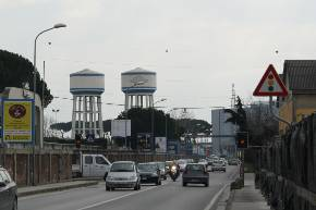 Pisa saint gobain